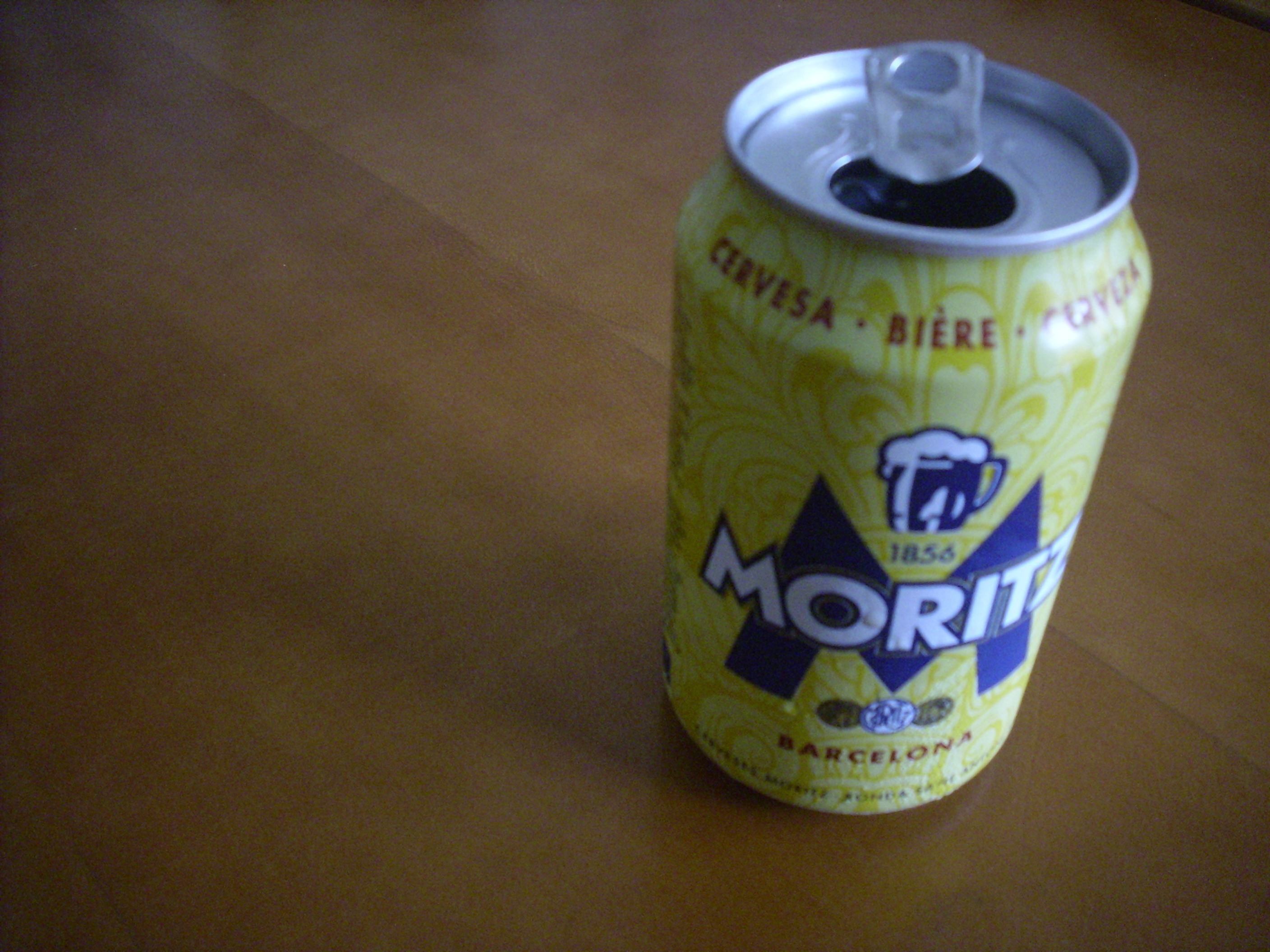 Llauna de cervesa Moritz